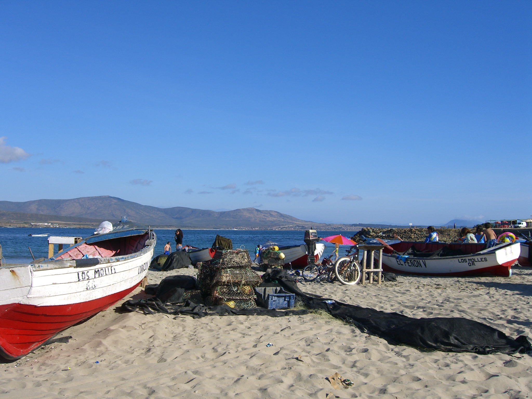 Fischerboote in Los Molles - V Region Chile